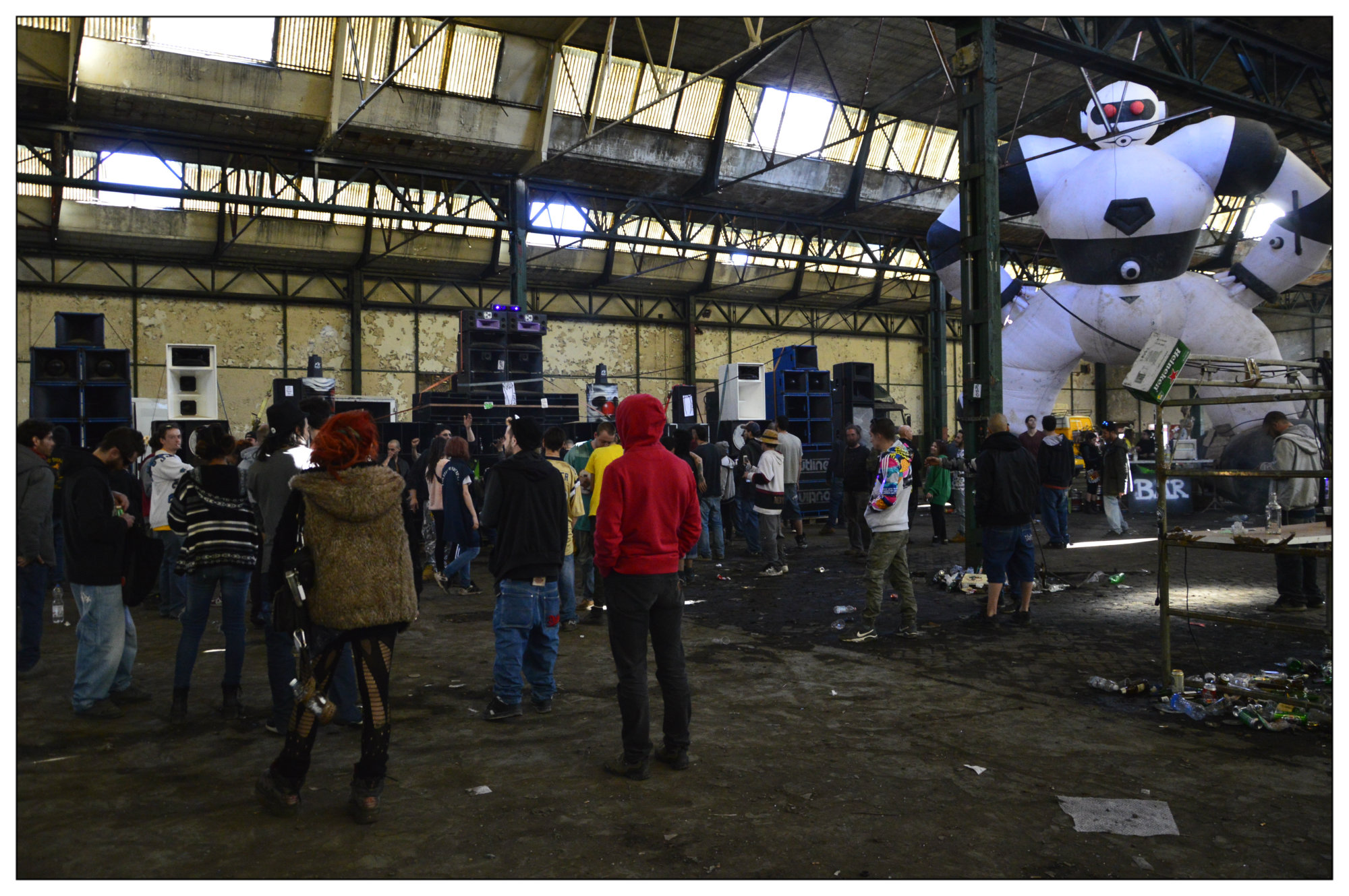 Free party in italia